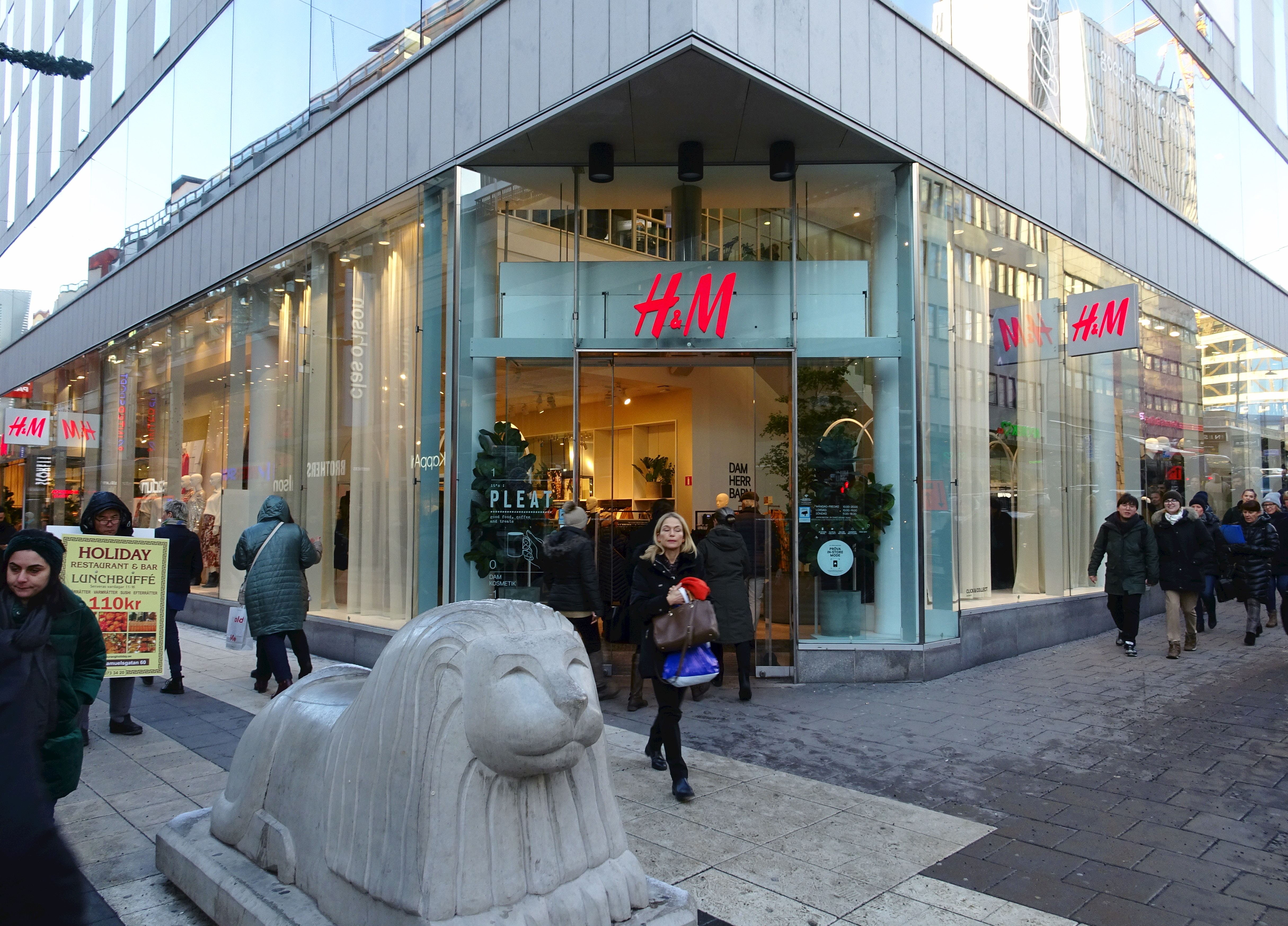 H&M, Drottninggatan, Mäster Samuelsgatan